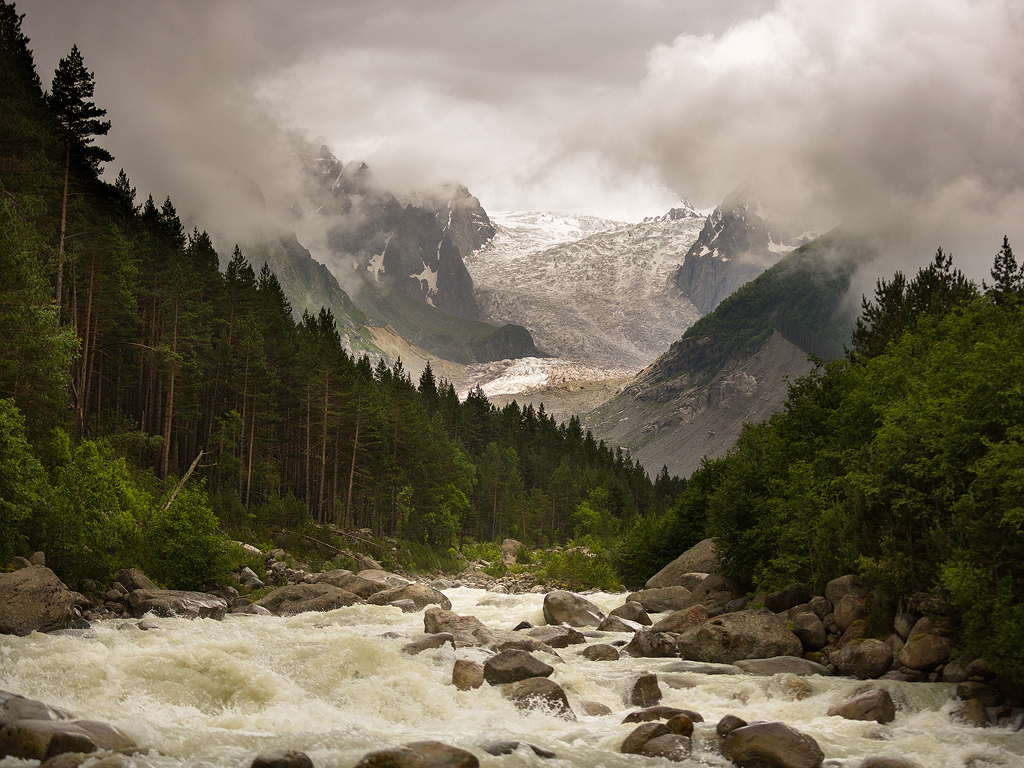 Караугомский ледник, Ирафский район This image is related to the protected area of Russia number 1510218